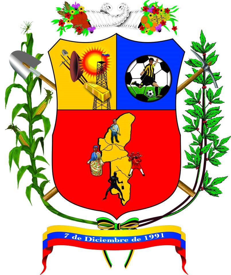 Escudo del municipio El Callao. Estado Bolívar. Venezuela